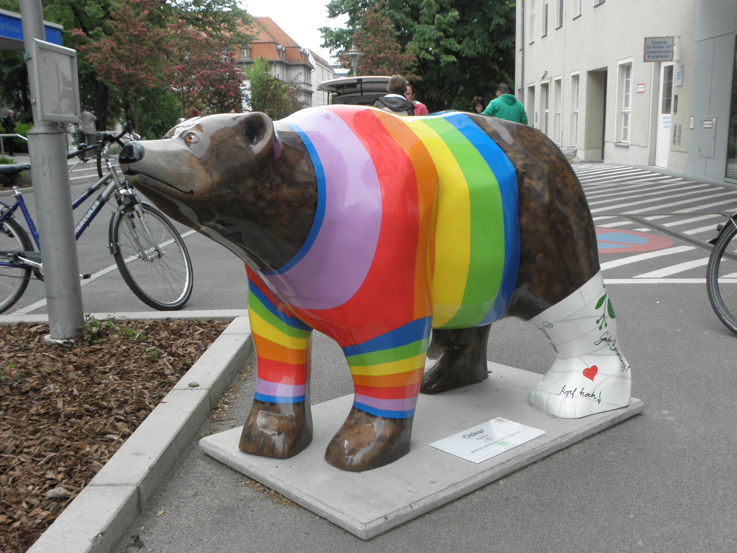 Berlin-Lichtenberg; "Oskar", Buddy Bear auf dem Gelände des Oskar-Ziehten-Krankenhauses (Sana-Klinikum), Hubertusstraße. Künstler artefix, gestiftet vom Förderverein "Lindenblatt"